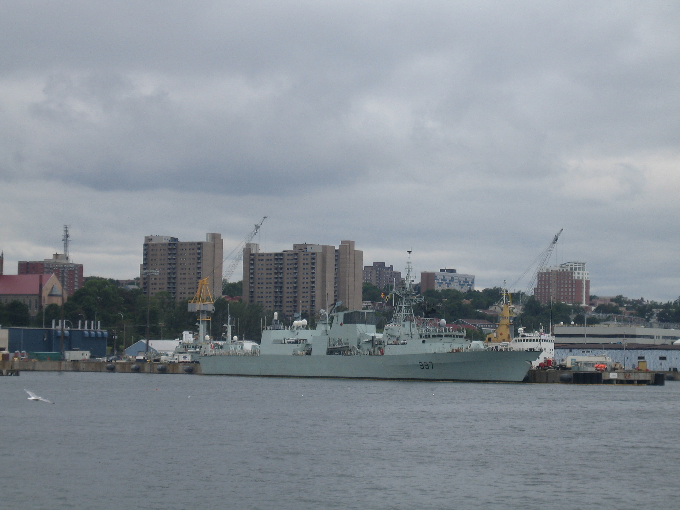 The HMCS Fredericton (FFH 337) ship of Halifax class, Canadian frigate in service 1994 - 2011 always in service today. One of serial of 12 frigates. Le NCSM Fredericton (FFH 337) est une frégate canadienne, le huitième d'une série de douze navires de la classe Halifax. Il est en service depuis 1994, en 2011 toujours en service.